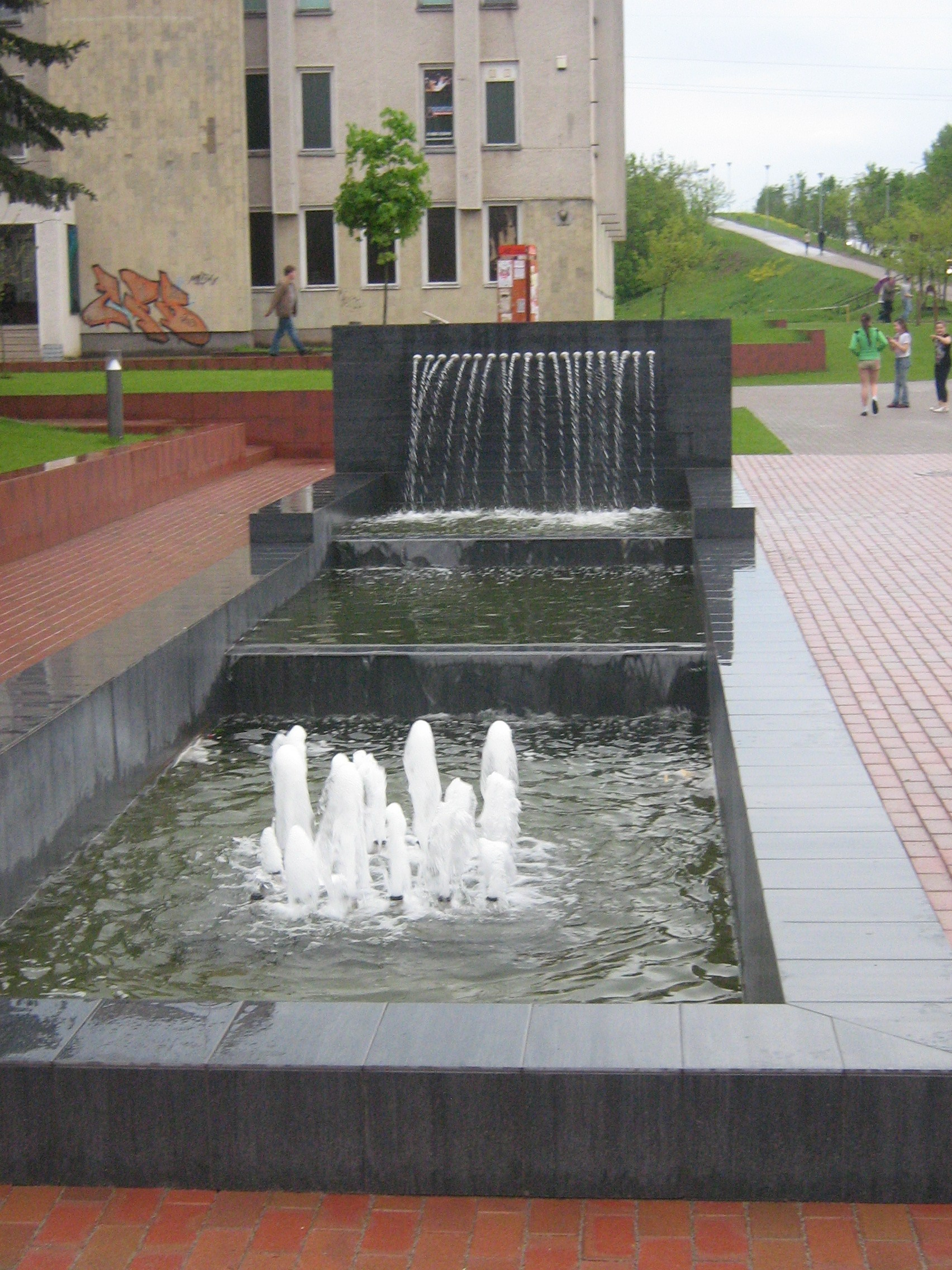 Fontanai Jonavos Santarvės aikštėje